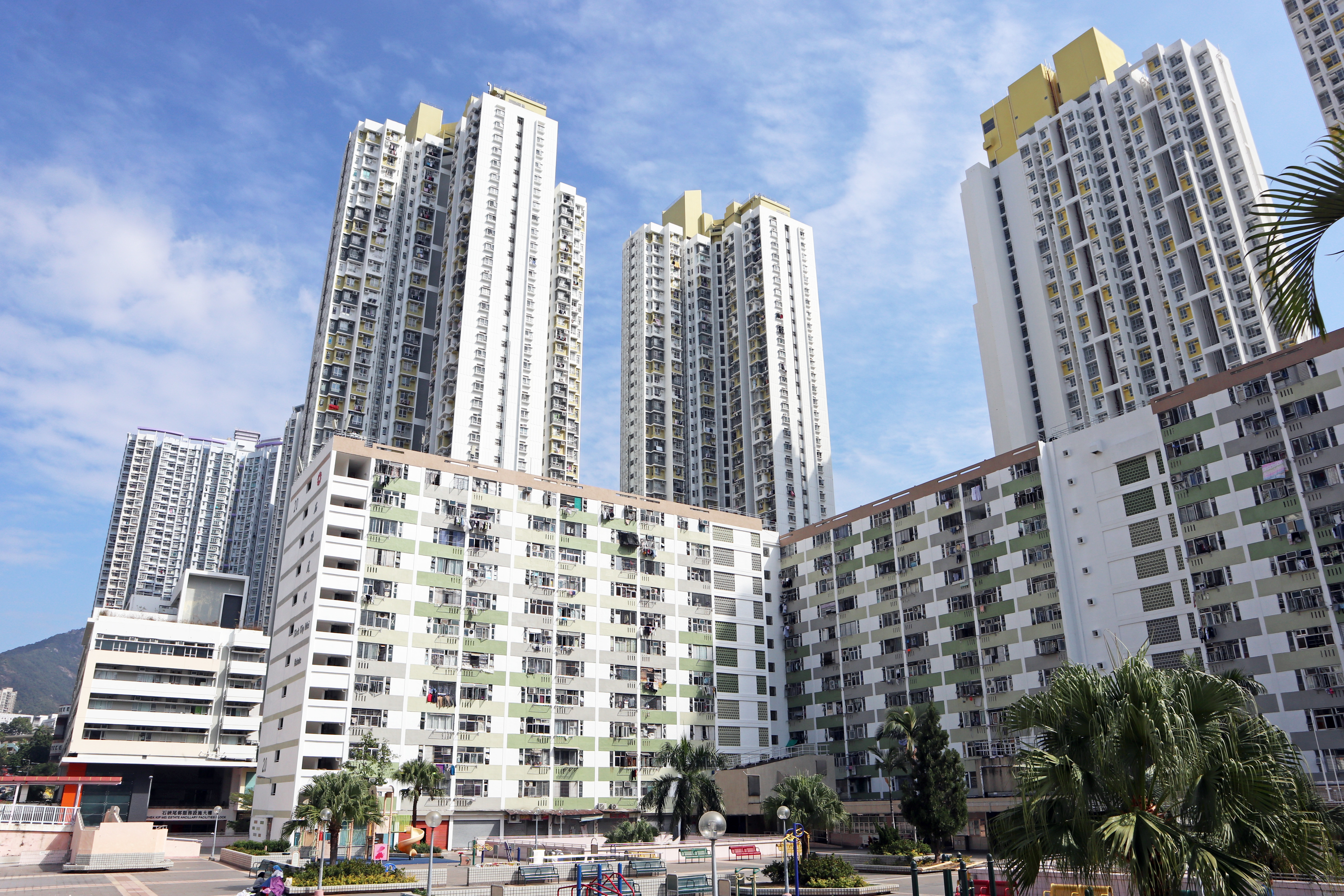 石硤尾邨美薈樓、美亮樓、第十九座、第二十座